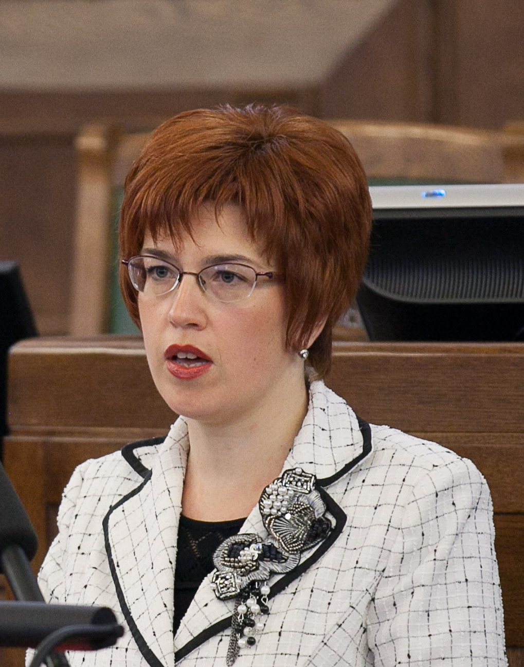 2011.gada 17.oktobris. Deputāte Irina Cvetkova dod svinīgo solījumu. Foto: Ernests Dinka, Saeimas Kanceleja